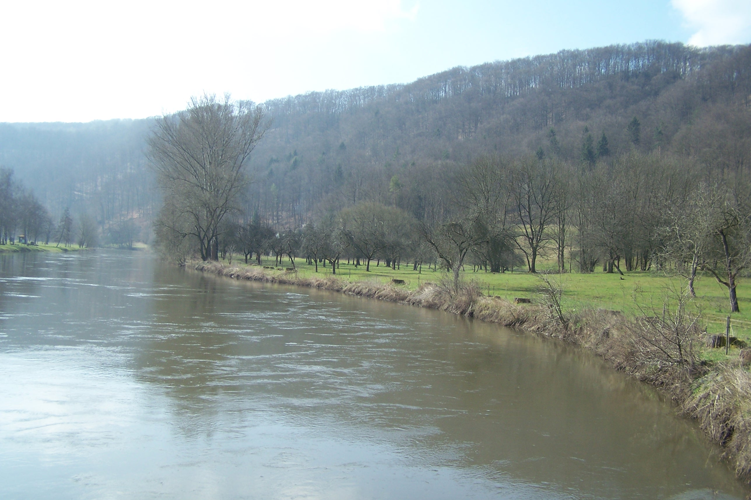 Frankenroda